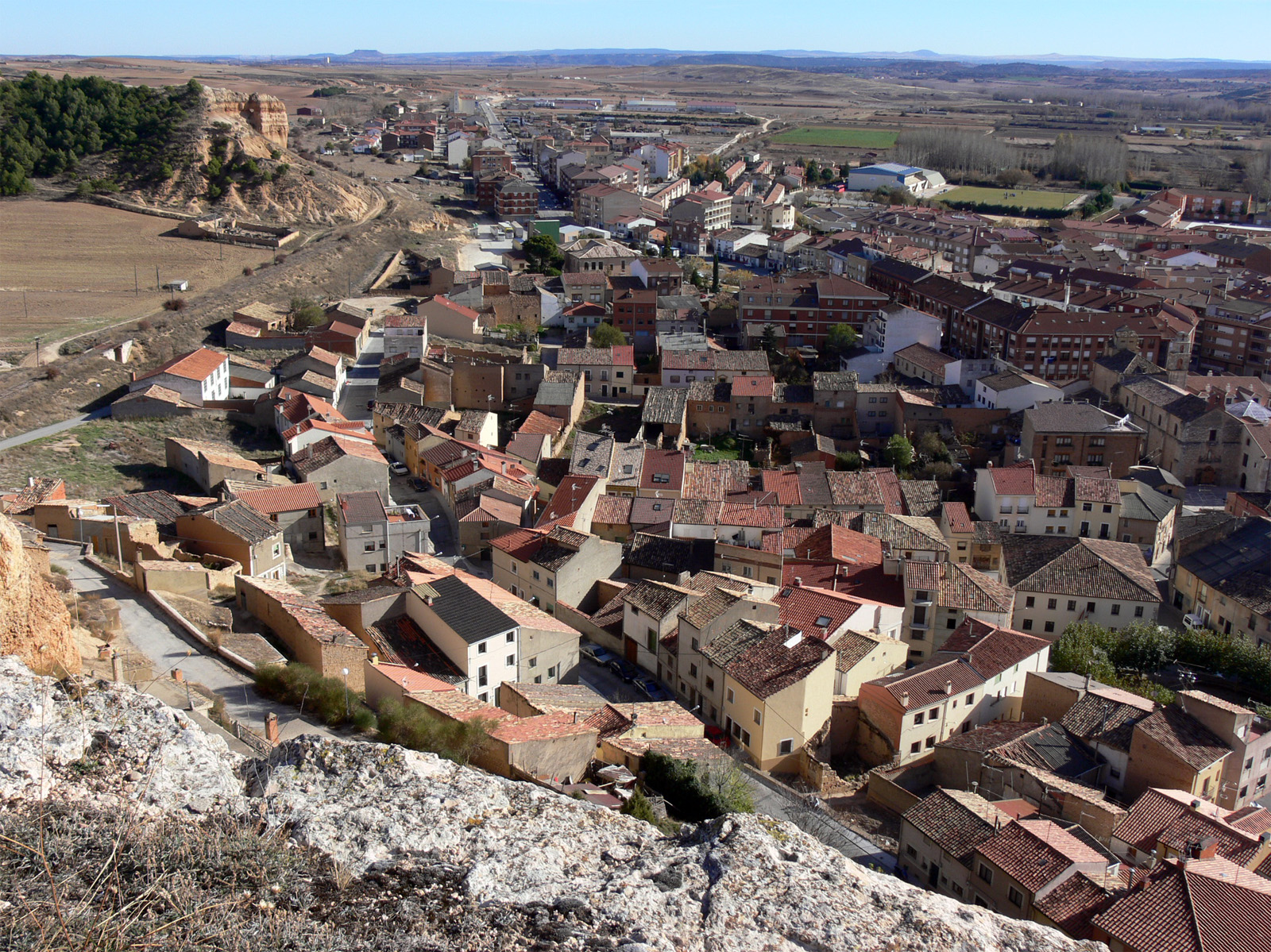 San Esteban de Gormaz, Soria - España.